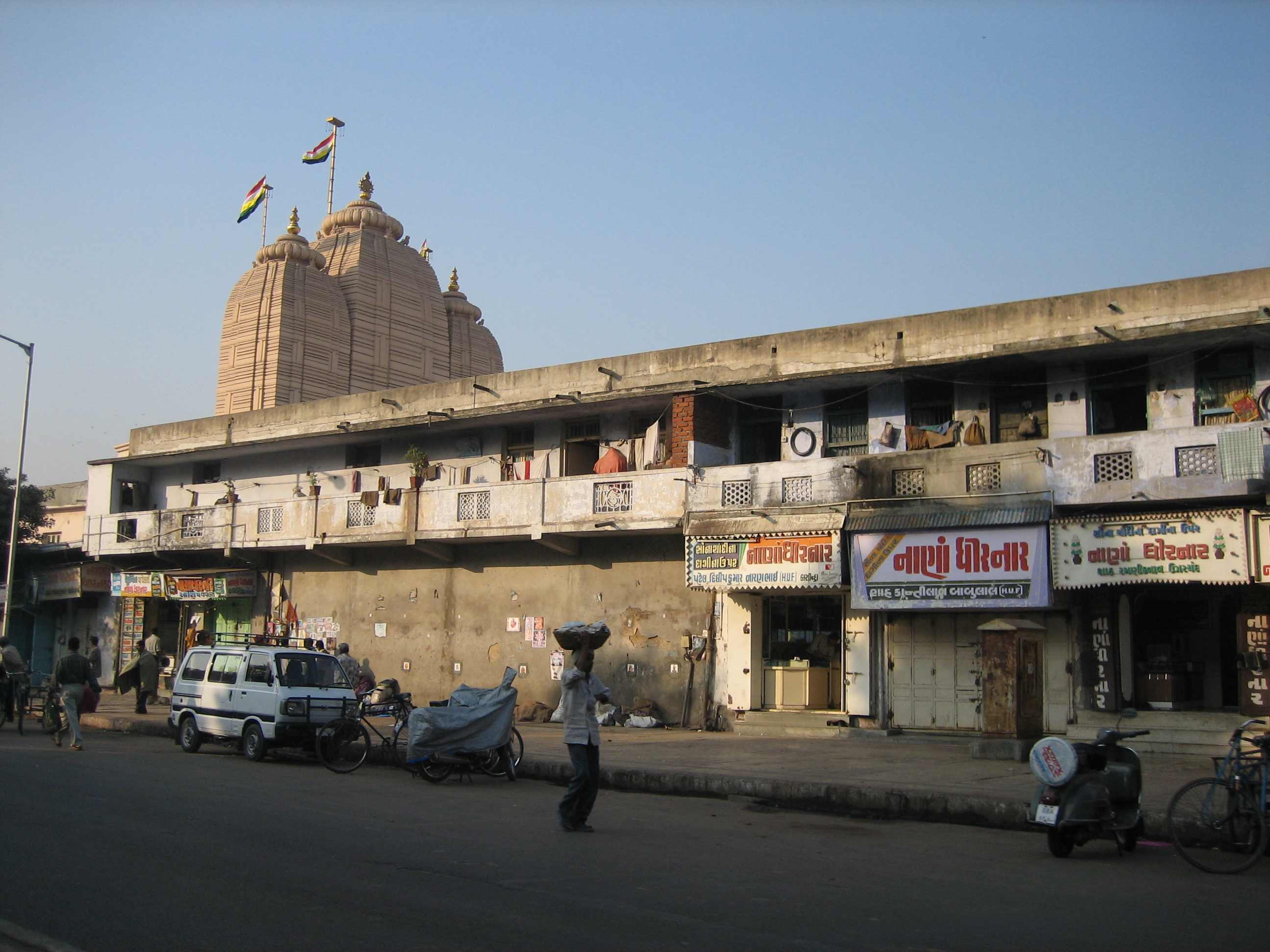 Ahmedabad 2007